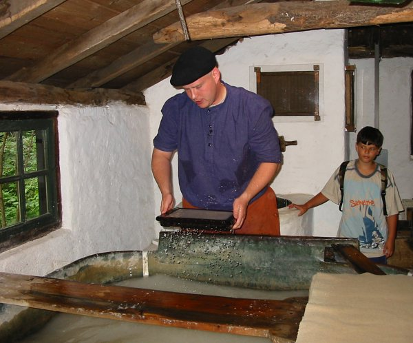 Het scheppen van papier met een zeefraam (Foto: Hans de Kroon)